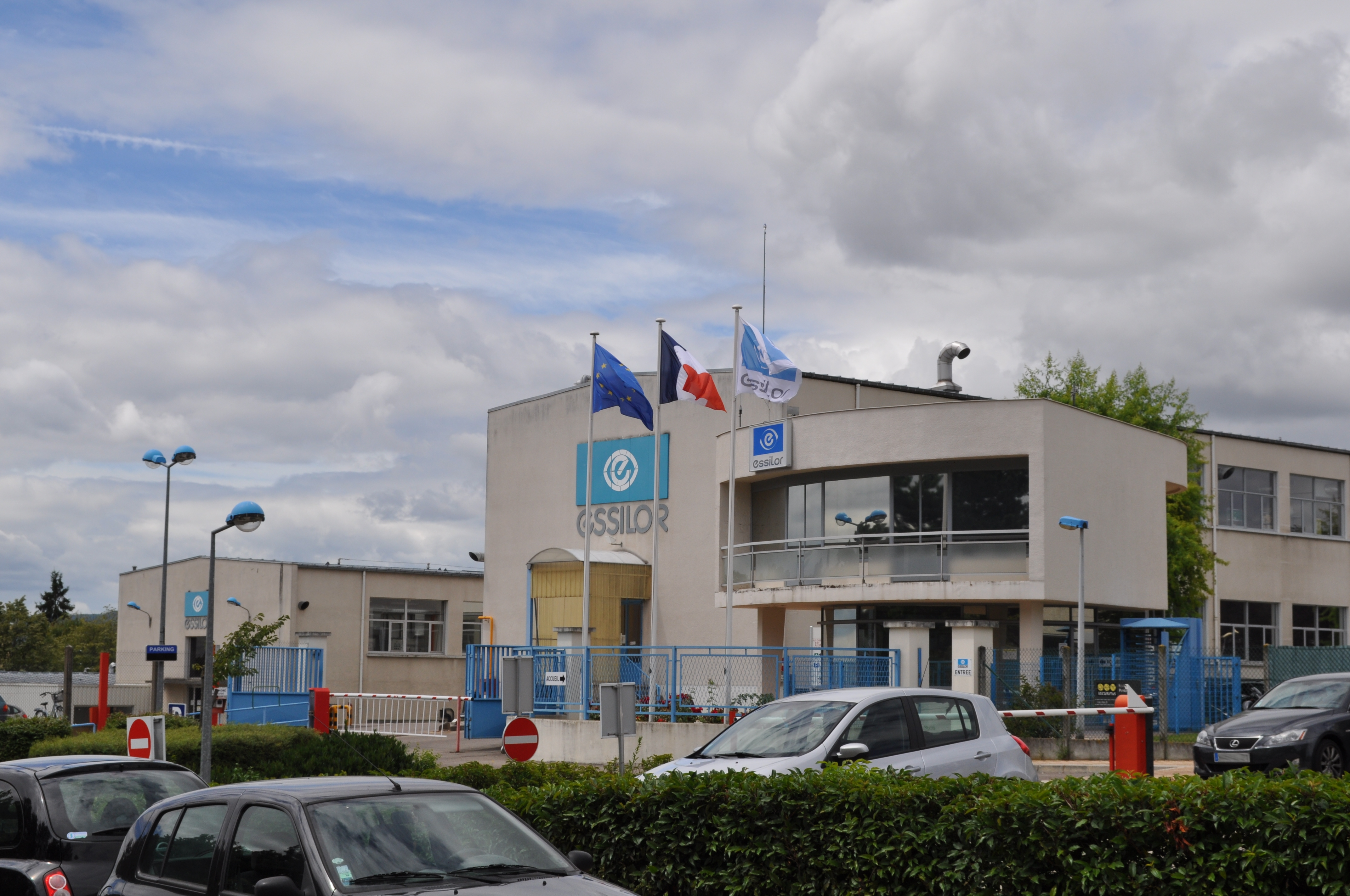 Usine Essilor à Dijon Unknown